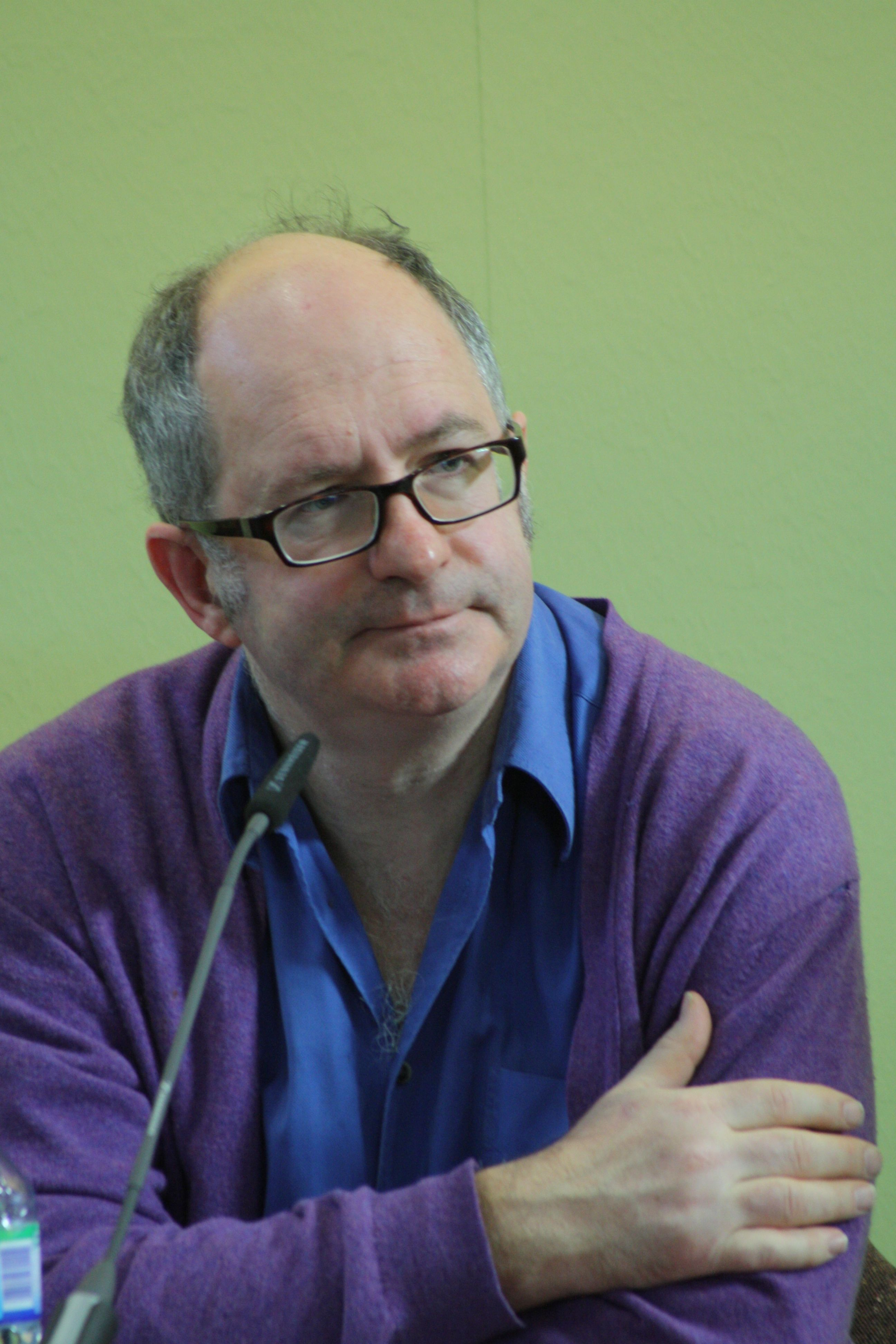 Der Schriftsteller John Lanchester präsentiert einen Essay zum Thema "Deutschlandbilder" im CAFÈ EUROPA auf der Leipziger Buchmesse 2013